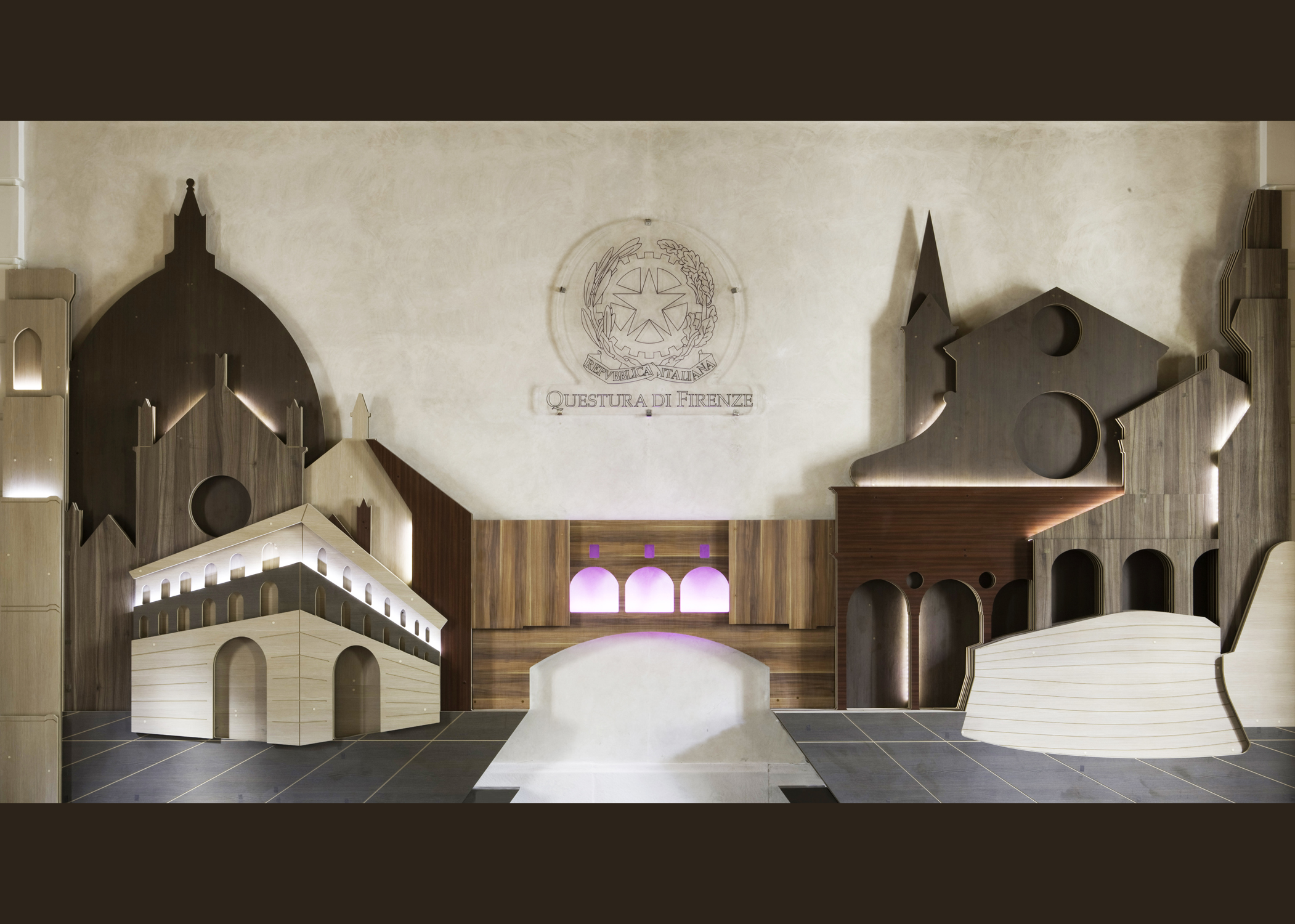 Opera realizzata per la Questura di Firenze